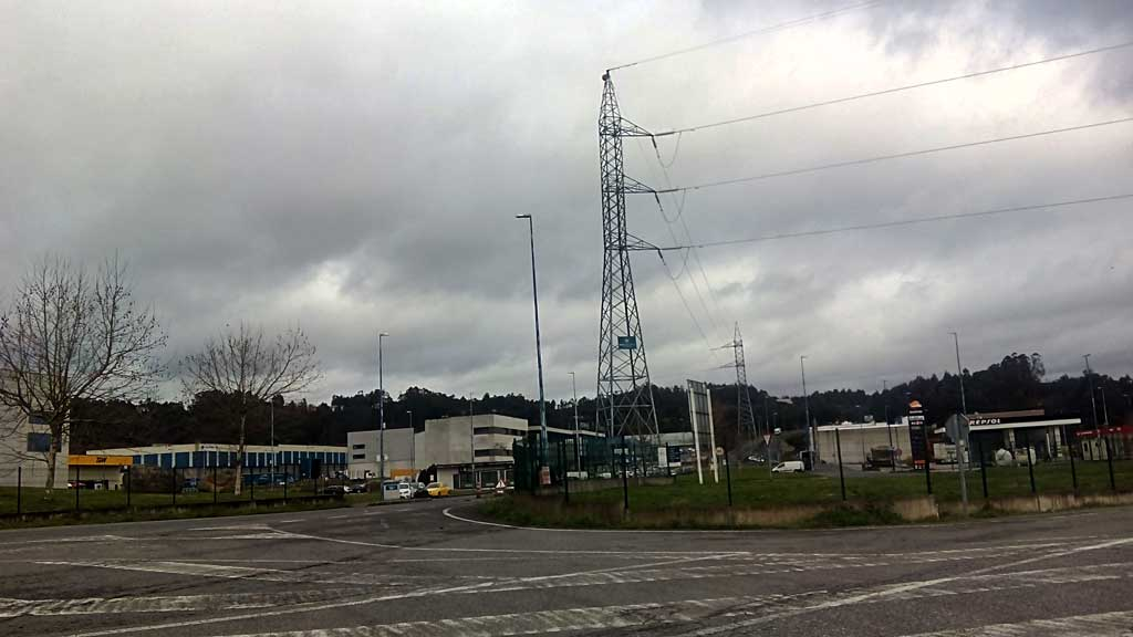 Vista do polígono de Ledoño, Culleredo.